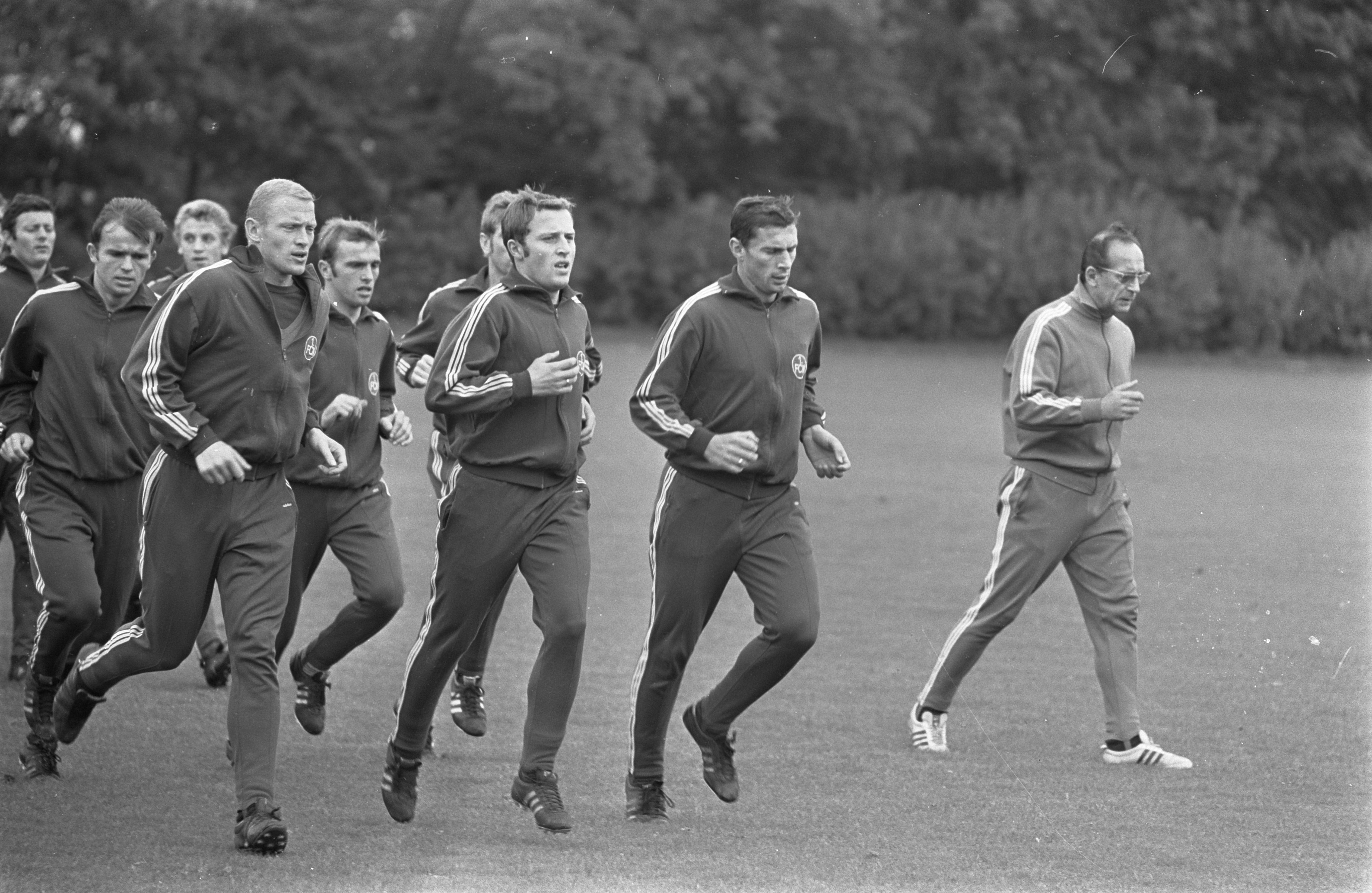 Collectie / Archief : Fotocollectie Anefo Reportage / Serie : Voetbalclub FC Nurnberg traint olv. Max Merkel bij het Olympisch Stadion ter voorbereiding op de wedstrijd tegen Ajax Beschrijving : voetbal, trainingen Datum : 30 september 1968 Locatie : Amsterdam, Noord-Holland Trefwoorden : trainingen, voetbal Persoonsnaam : Merkel, Max Fotograaf : Fotograaf Onbekend / Anefo Auteursrechthebbende : Nationaal Archief Materiaalsoort : Negatief (zwart/wit) Nummer archiefinventaris : bekijk toegang 2.24.01.05 Bestanddeelnummer : 921-7261